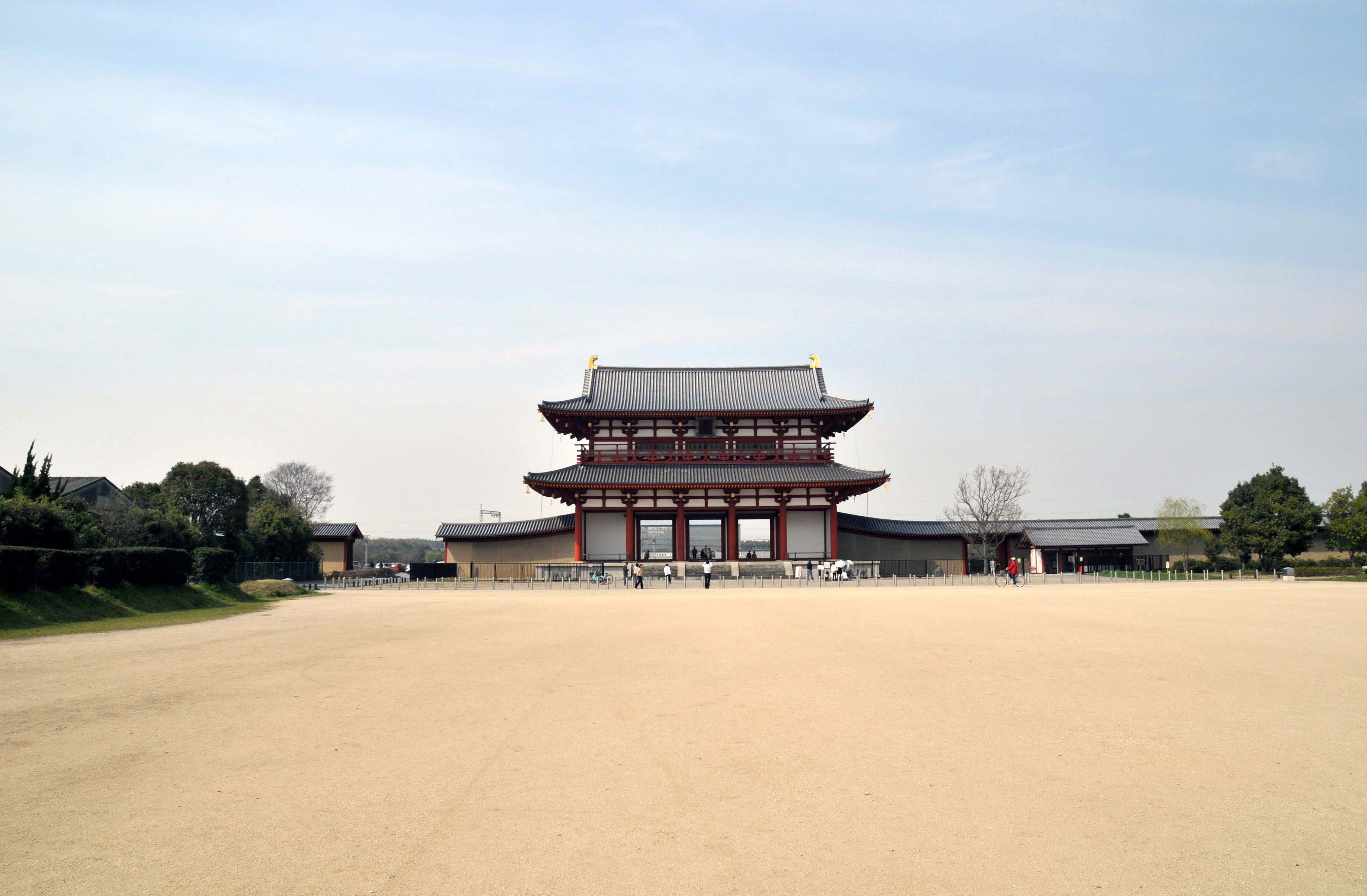 rebuilt Suzakumon gete of Heijo-kyo